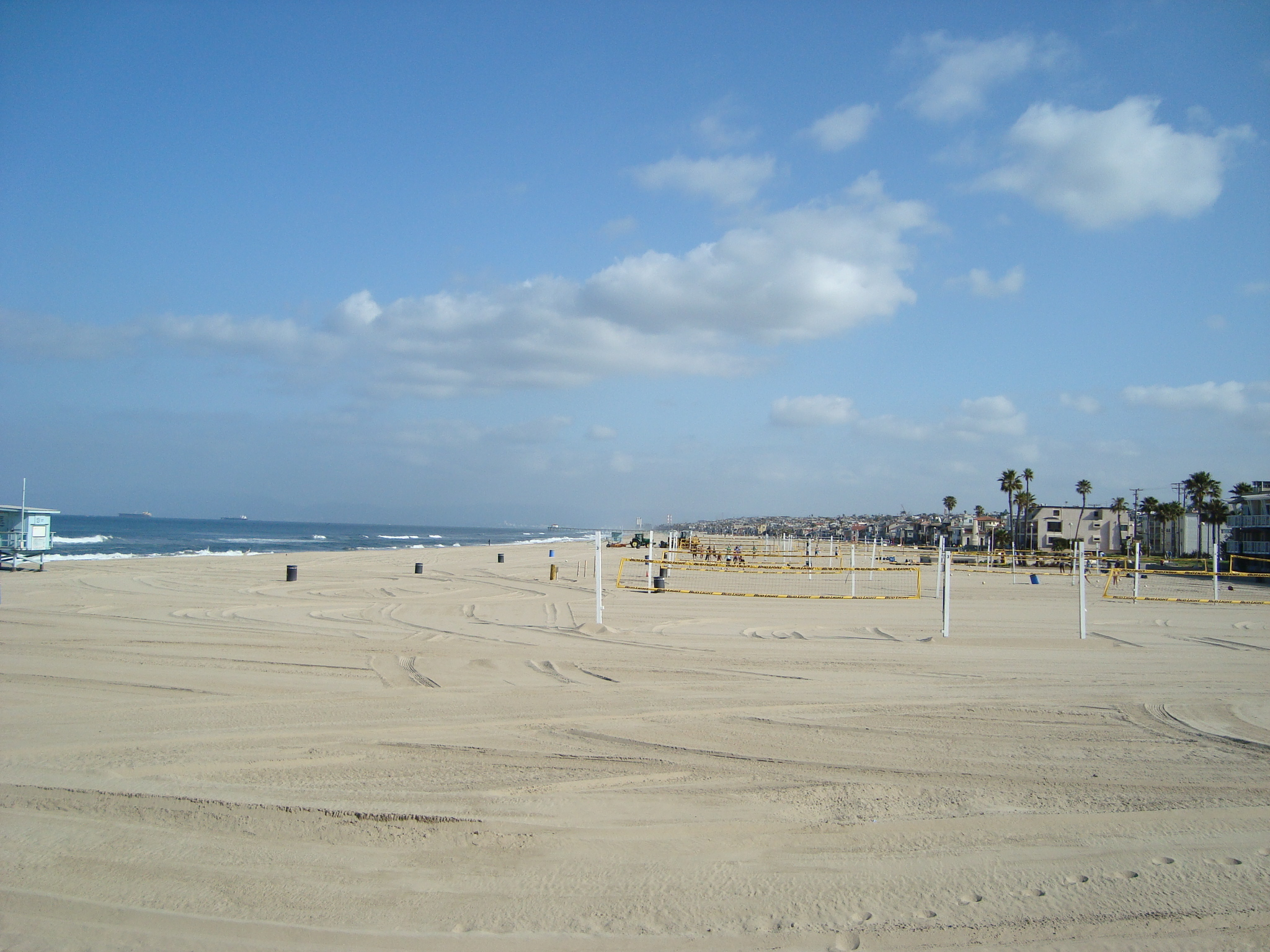 Hermosa Beach